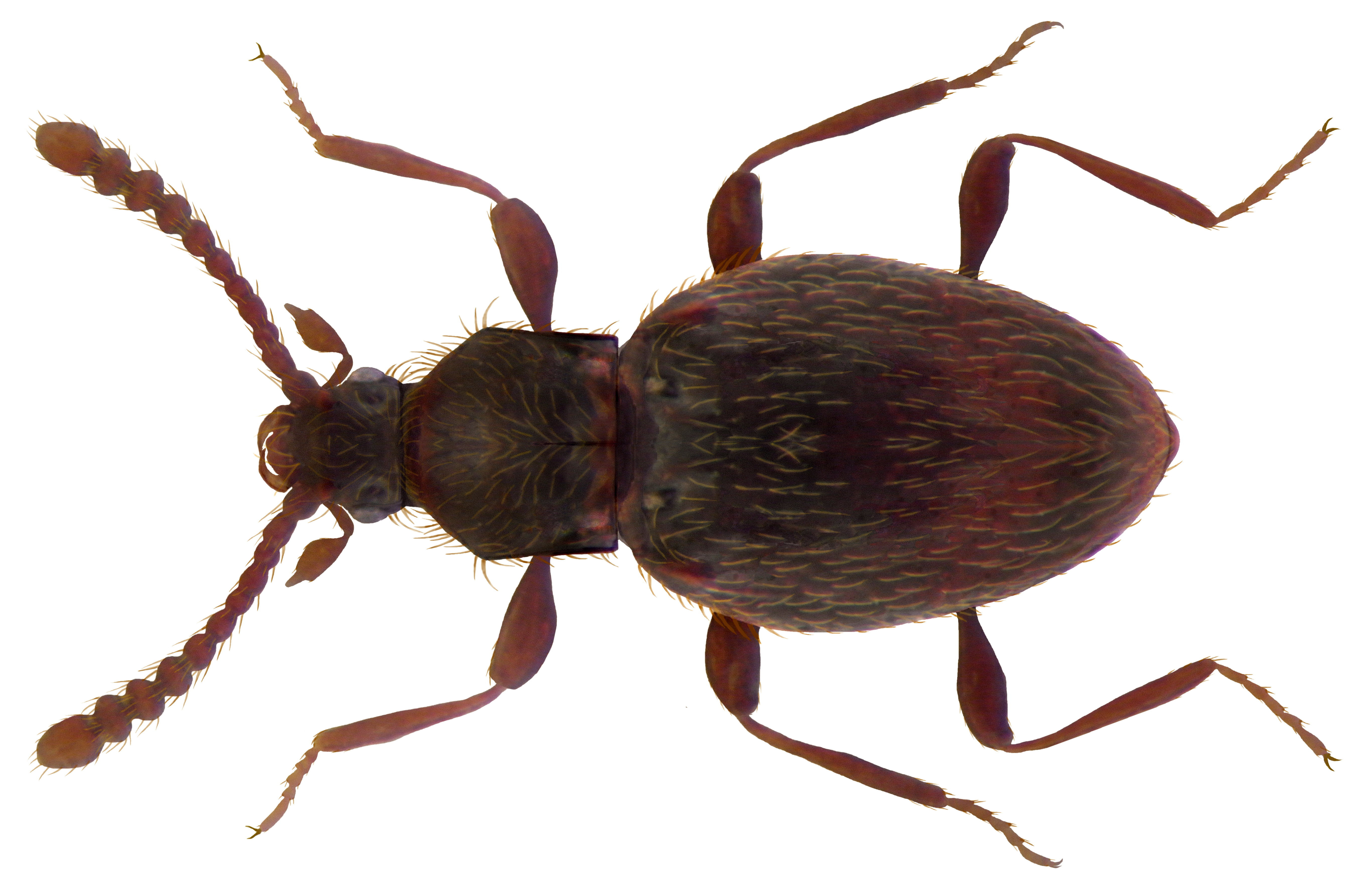 Familie: Scydmaenidae Groesse: 1,4-1,5 mm Verbreitung: Nord- und Mitteleuropa Ökologie: in Waldstreu, Moos und humoser Erde Fundort: Germania, Bayern, Oberfranken, Blankenstein, Saaleaue leg. A.Skale, 2003; det. W.Apfel, 2003 Photo: U.Schmidt, 2009